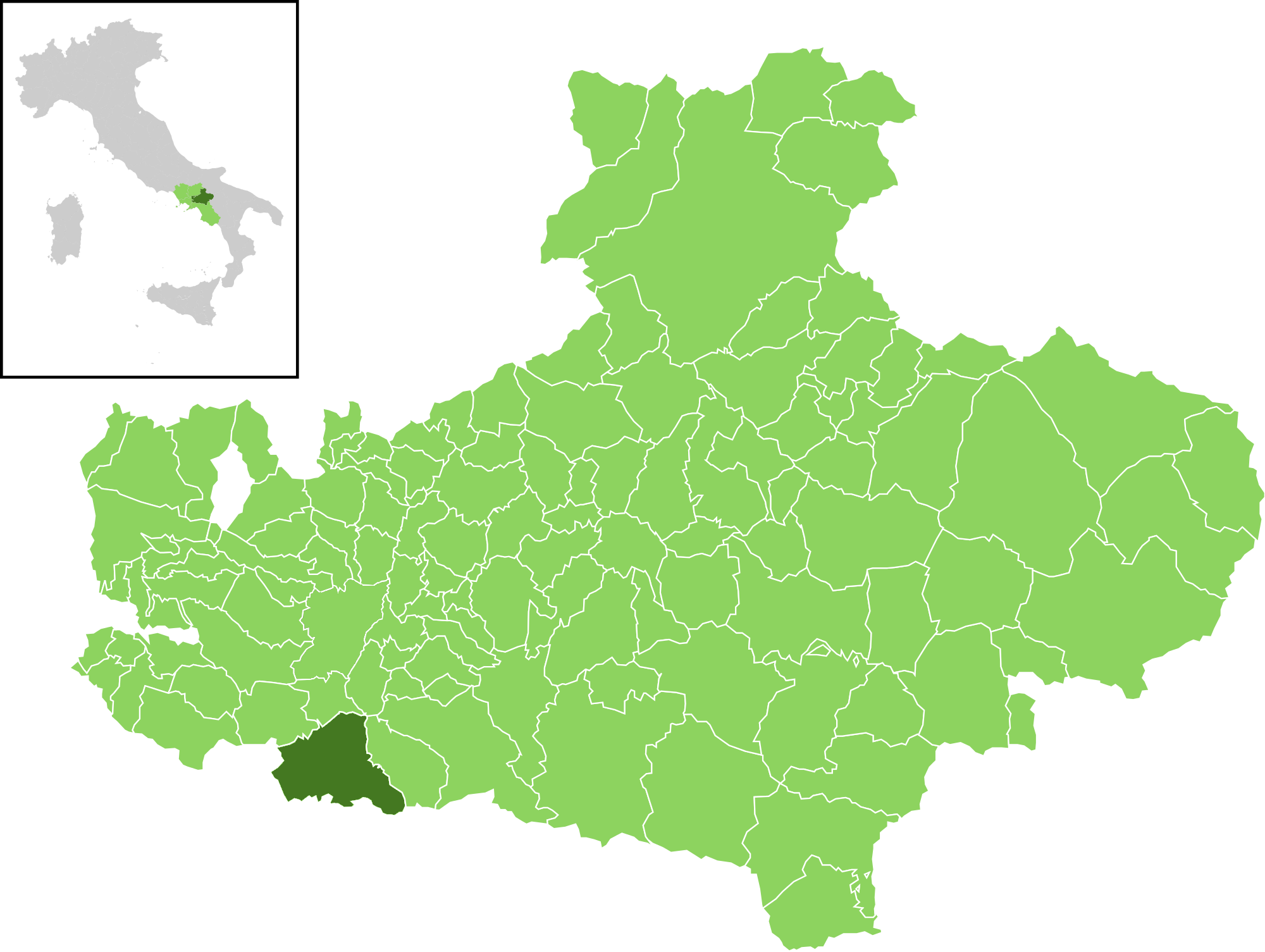 Posizione del comune all'interno della provincia di Avellino